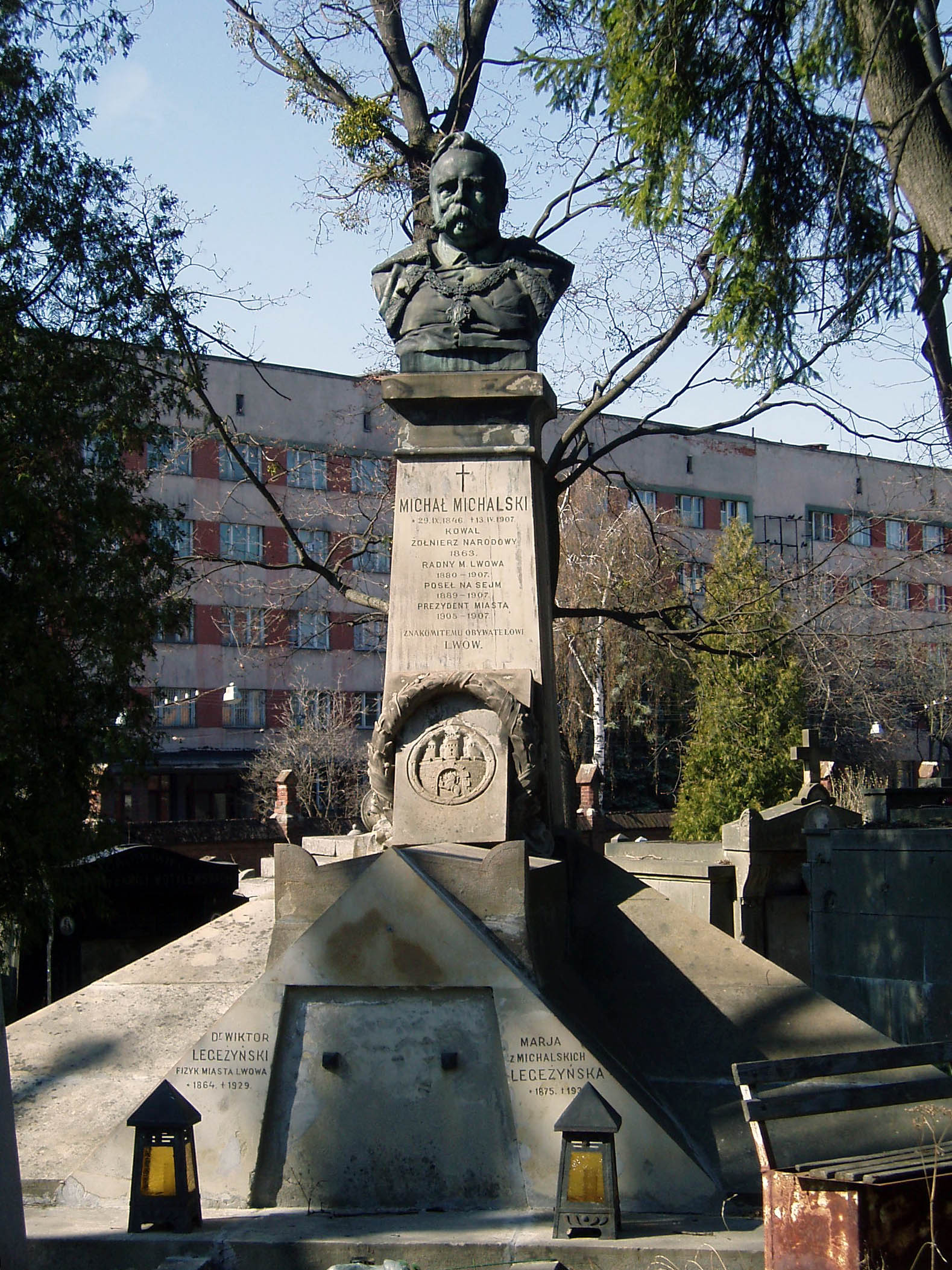 Надгробок президента Львова Міхала Міхальського. Скульптор Тадеуш Блотницький.